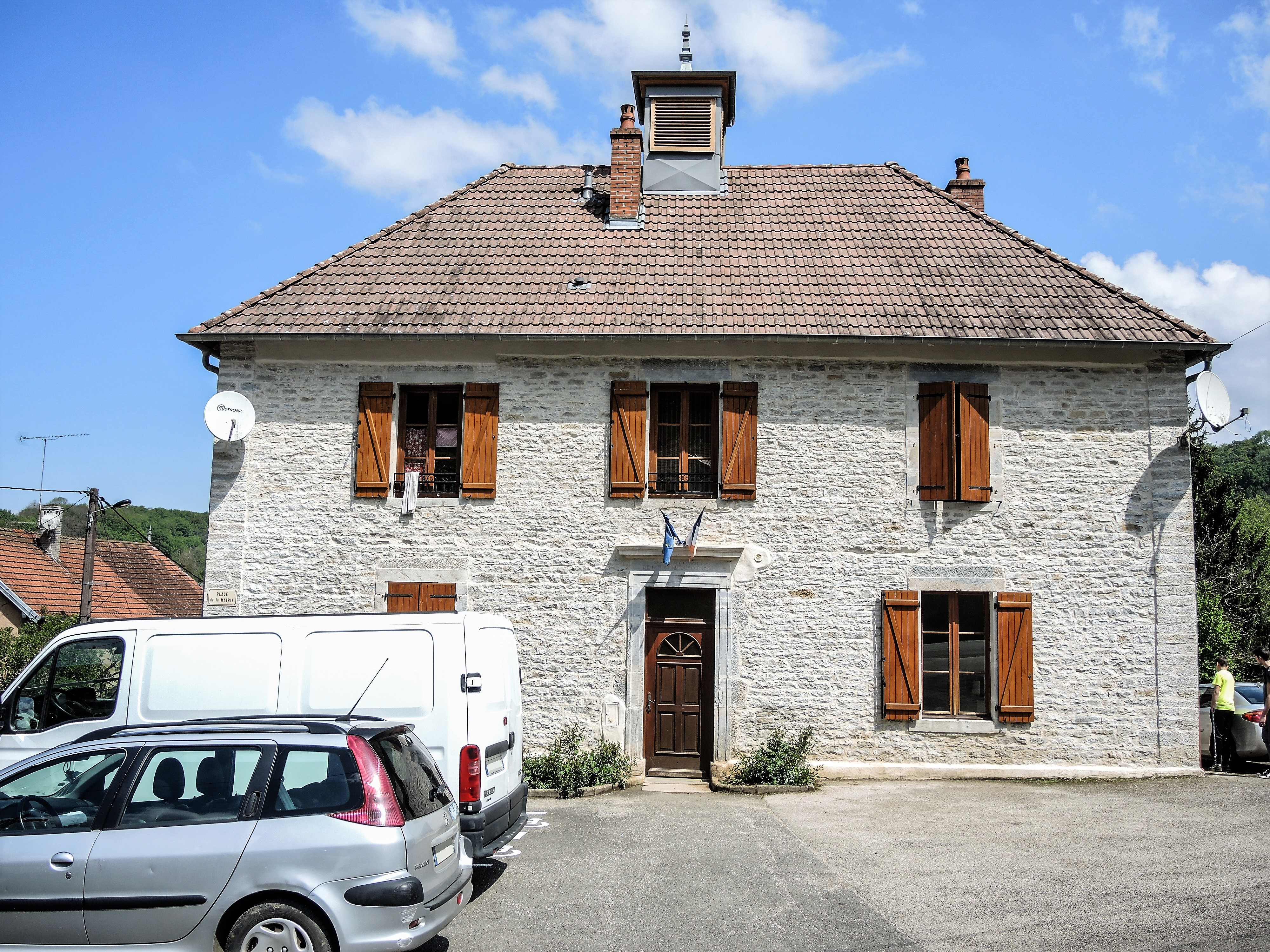 Mairie